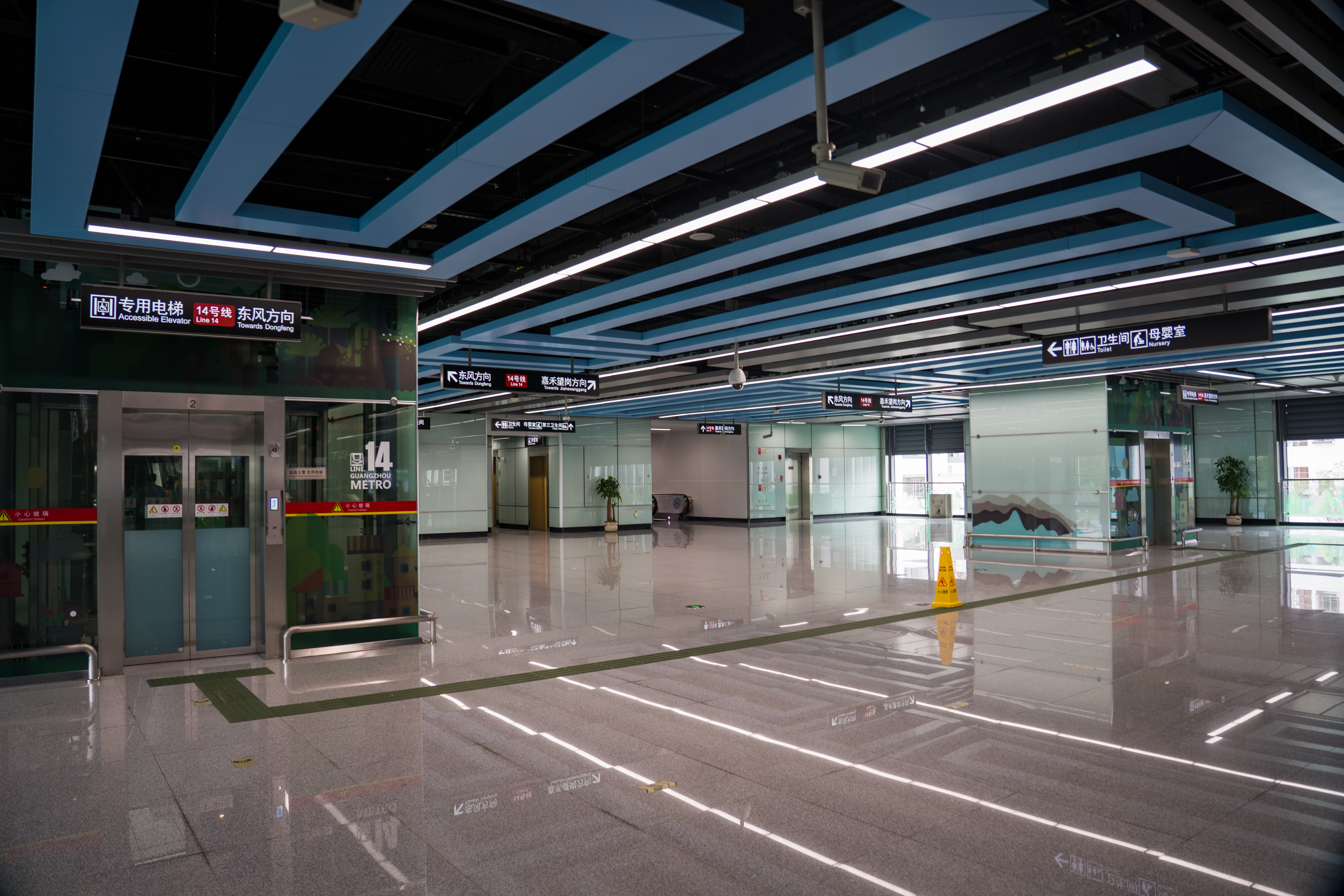 广州地铁太平站站厅